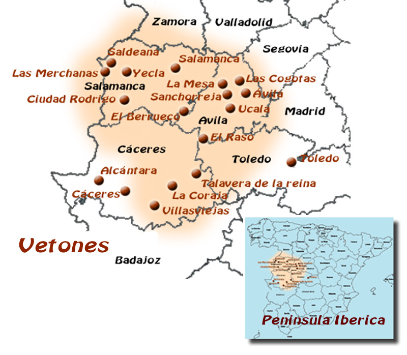 Situacion aproximada de los vetones en la peninsula Iberica.